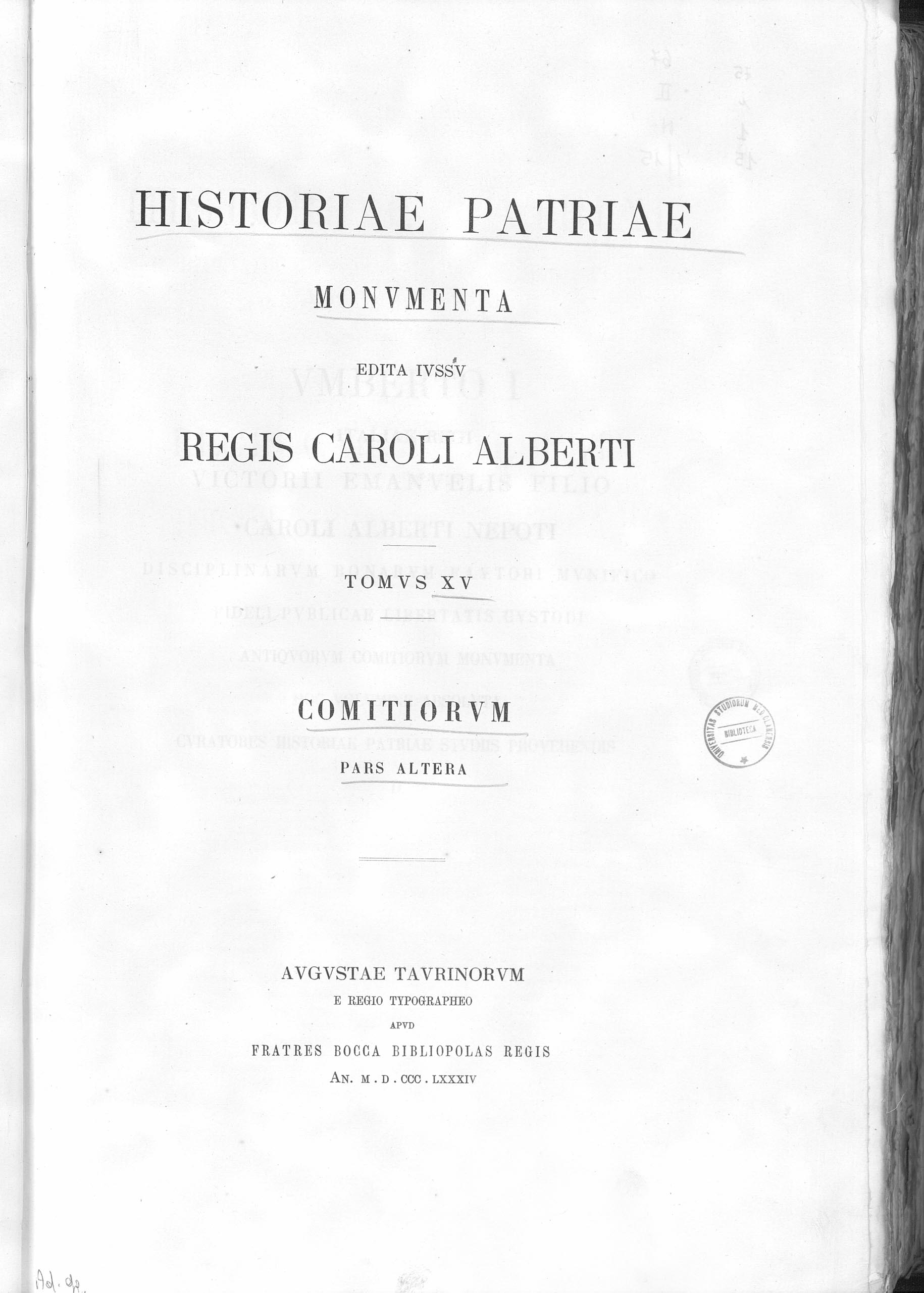 Frontespizio